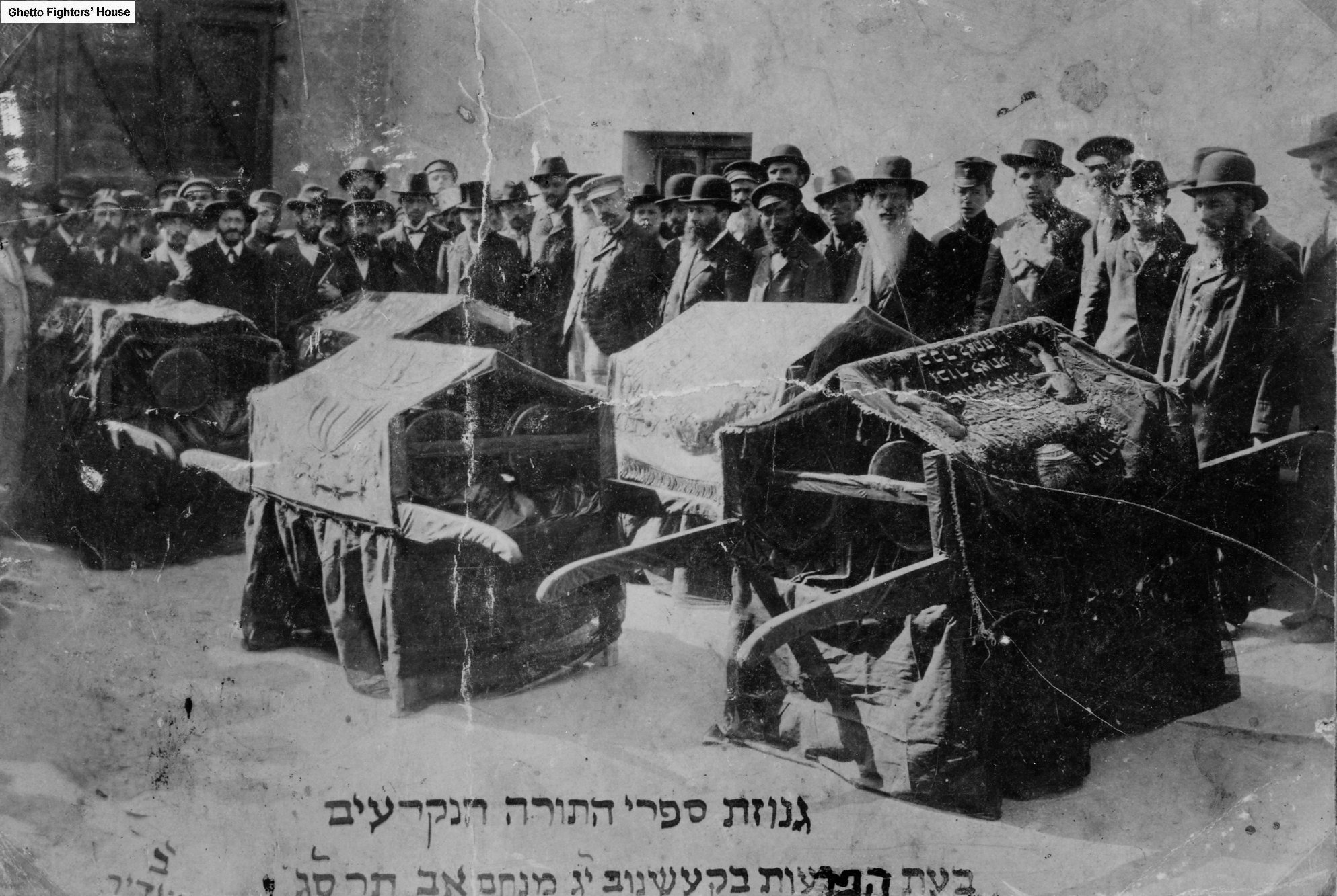 מעמד הלויית ספרי התורה של ספרי התורה. ליד הארון השני עומד חבוש בקסקט הרב מרדכי מנשה לינשיץ מראשי הקהילה מצד ימין עומד רב בקהילה עם זקן לבד..